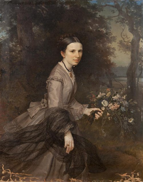 Евдокия (Авдотья) Ивановна Герье (1844-1914), урожденная Токарева.